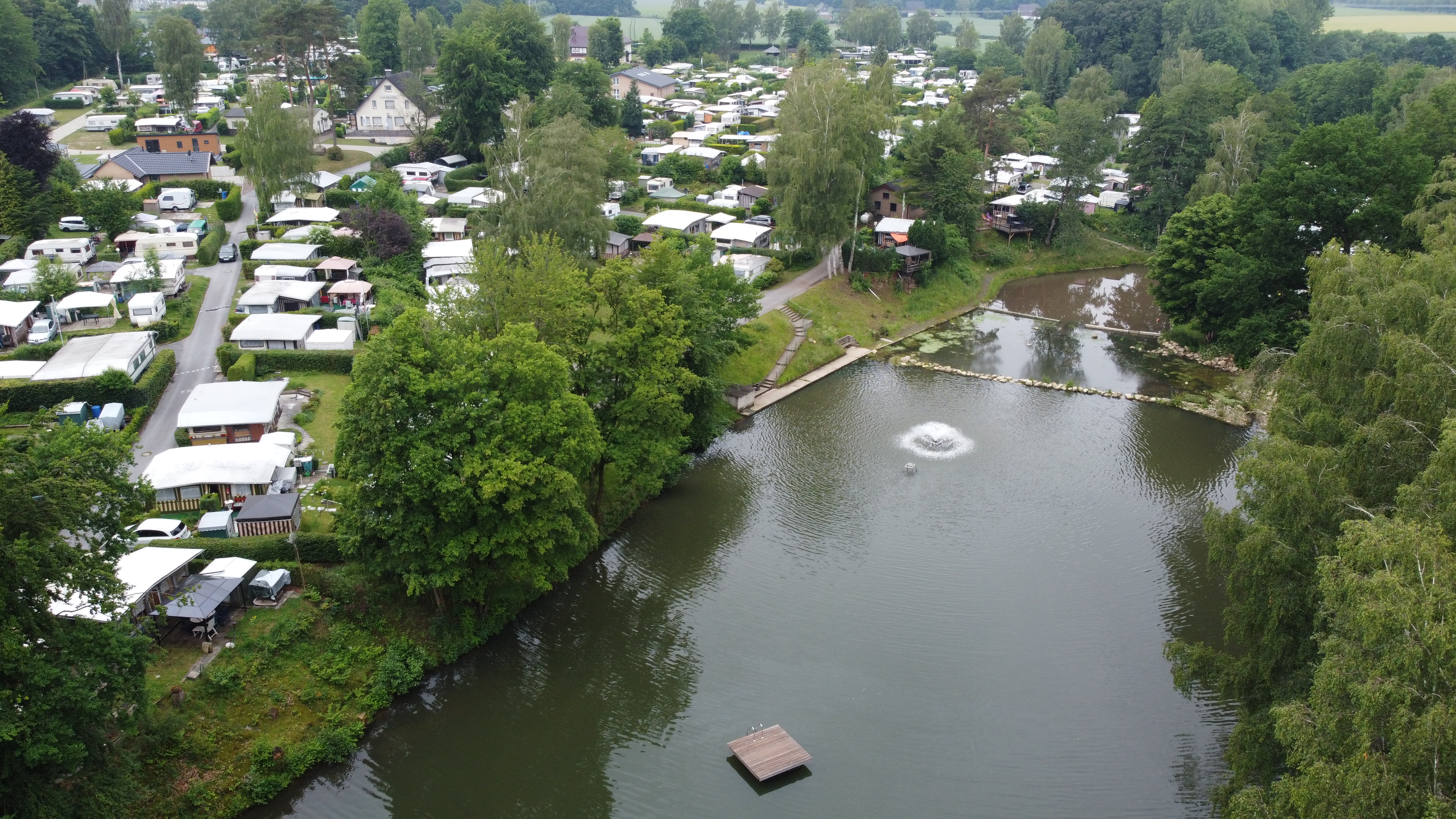 Elisabethsee Eickum mit Campingplatz Luftbild